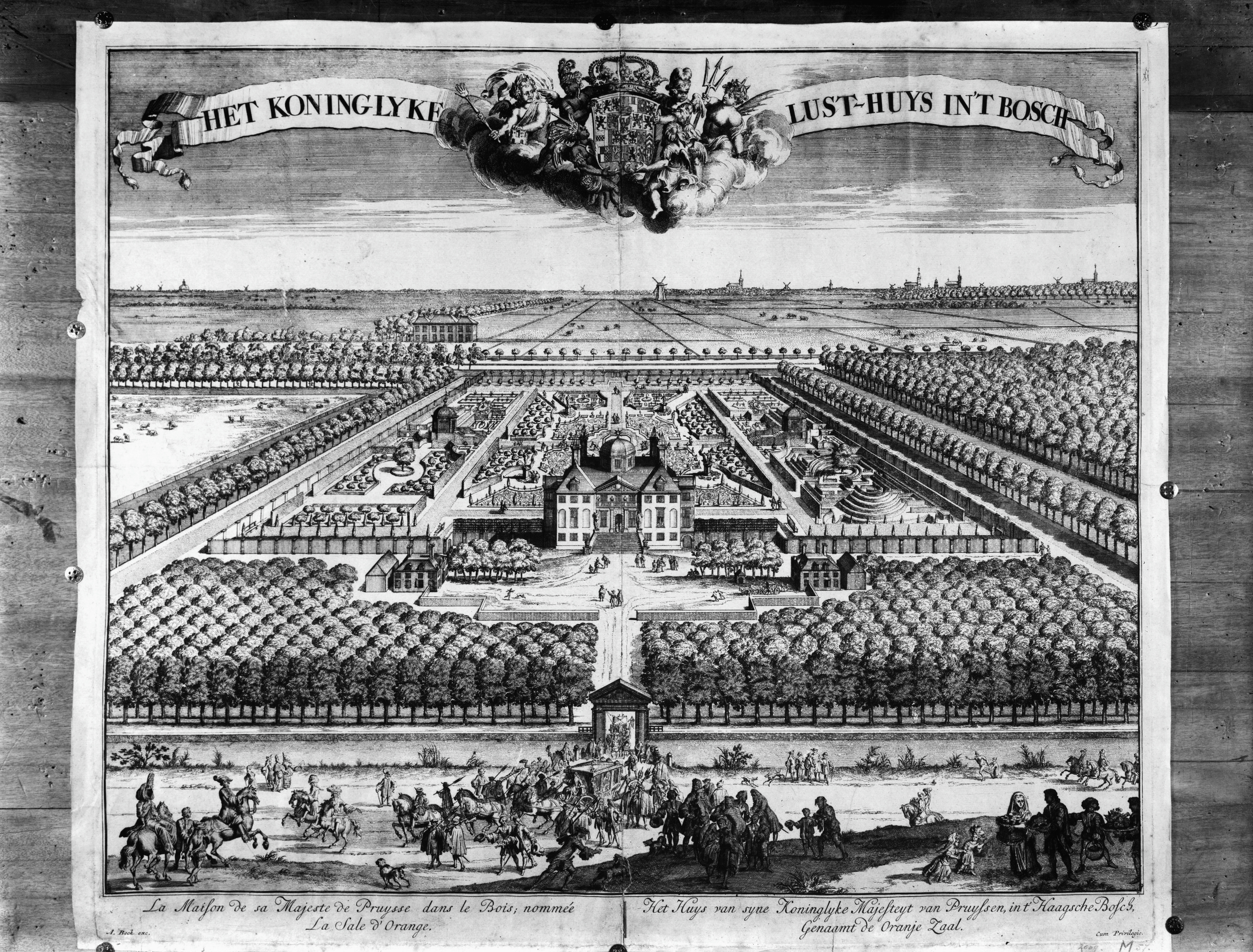 Huis ten Bosch: exterieur naar een gravure eind 17e eeuw, uitgeg. door Anna Beek in het Gemeente Archief